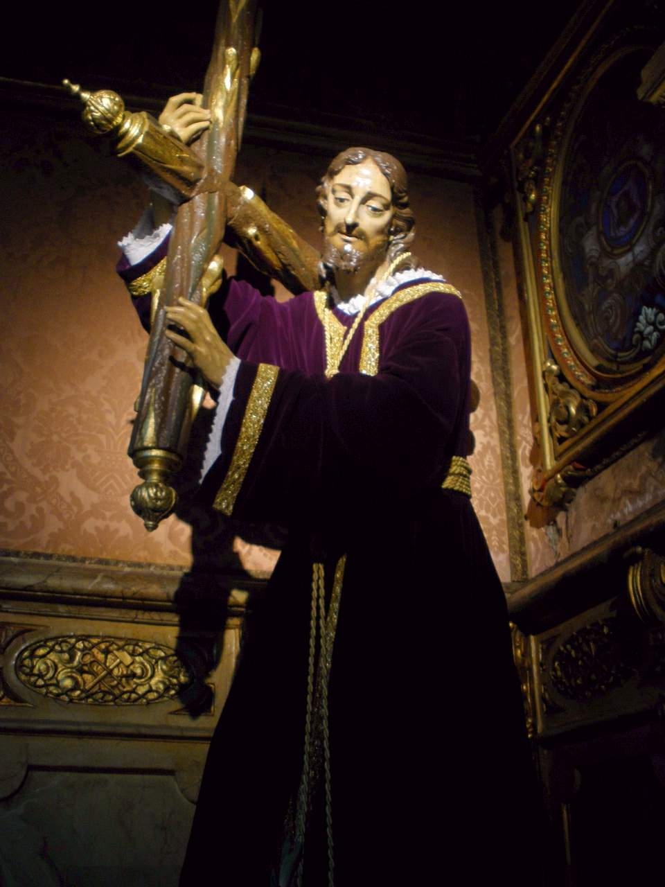 Iglesia de la Vera Cruz (Salamanca)